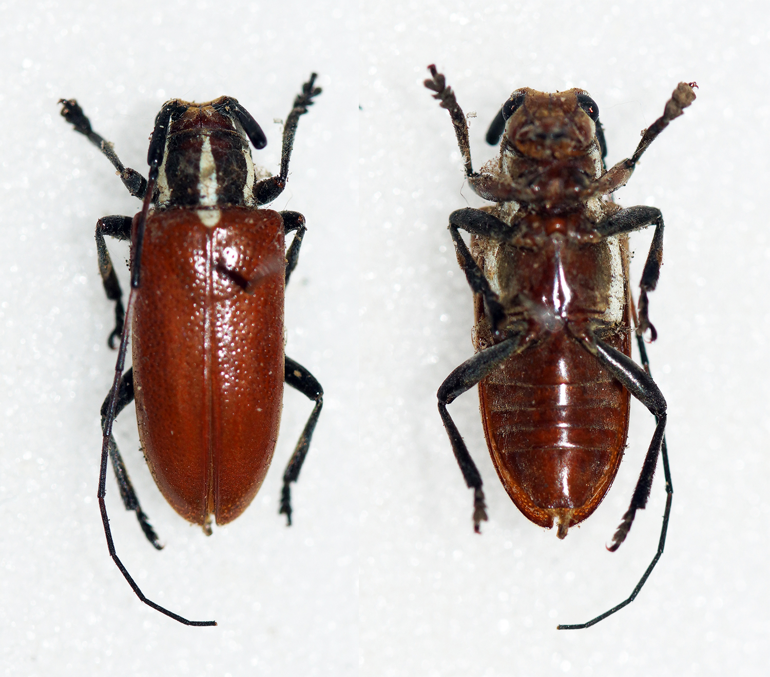 Quedenfeldt,1887 Sex: Male Data: 10-2013 - Mbalmayo - Cameroon Size: 10mm